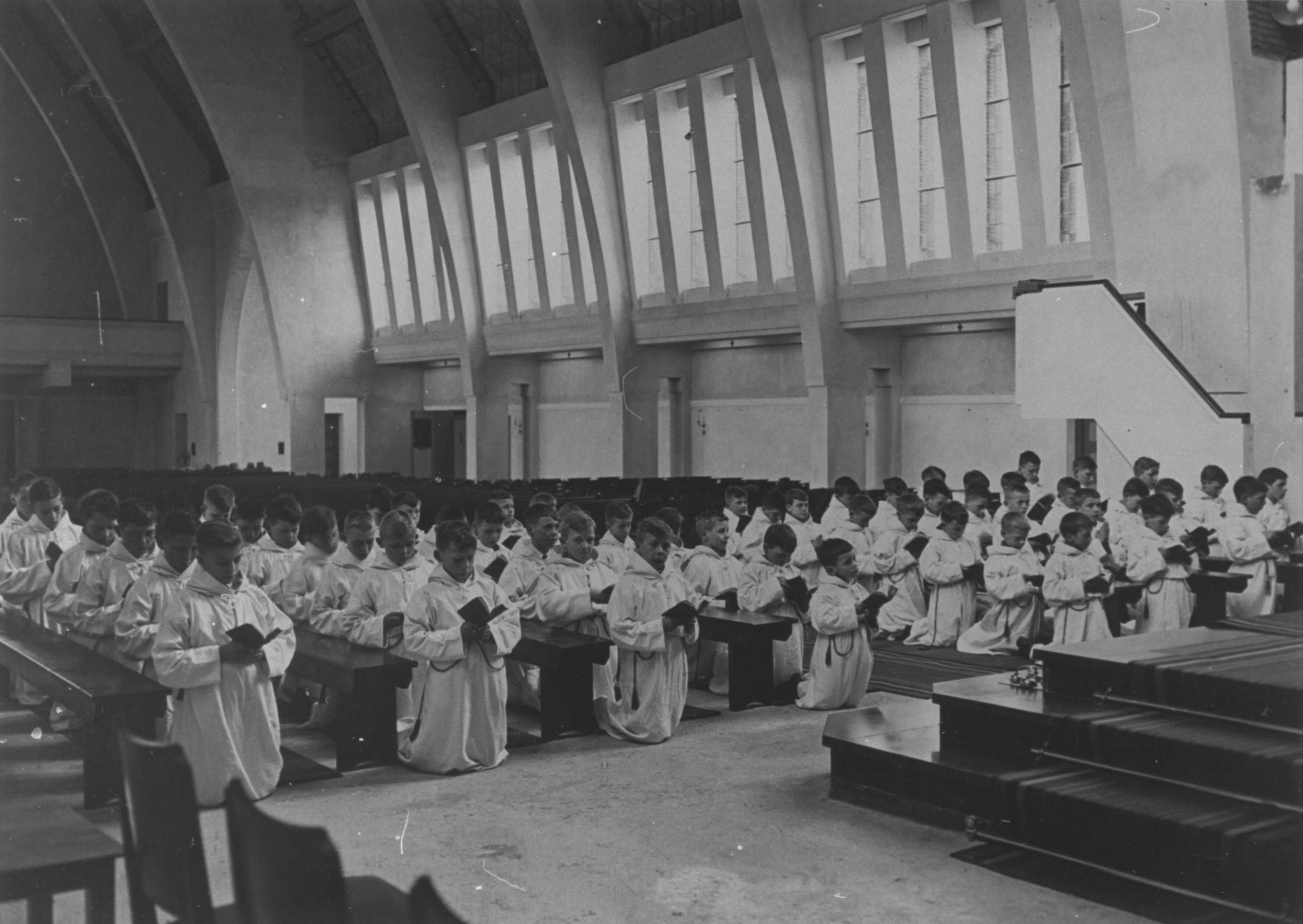 Communicantjes in de Christus Koningkerk